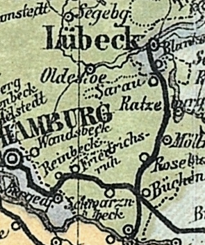 Ausschnitt LBE aus der Bahnkarte_Deutschland_1861